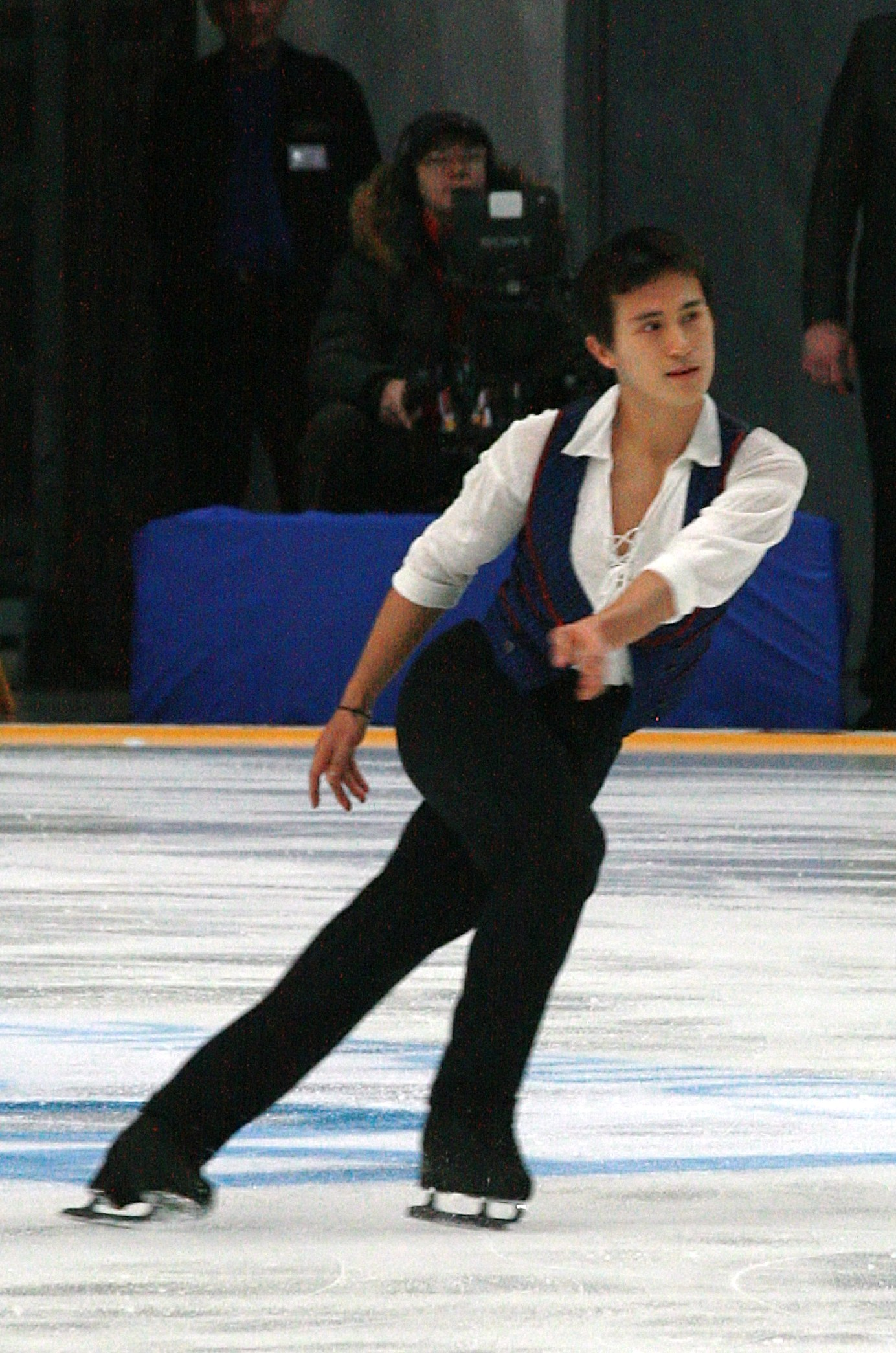 Патрик Чан (Канада) на Кубке Ростелекома 2012. Произвольная программа.